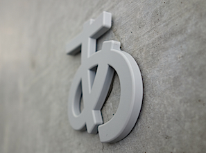 デザインあ展 （21_21 東京ミッドタウンにて撮影）